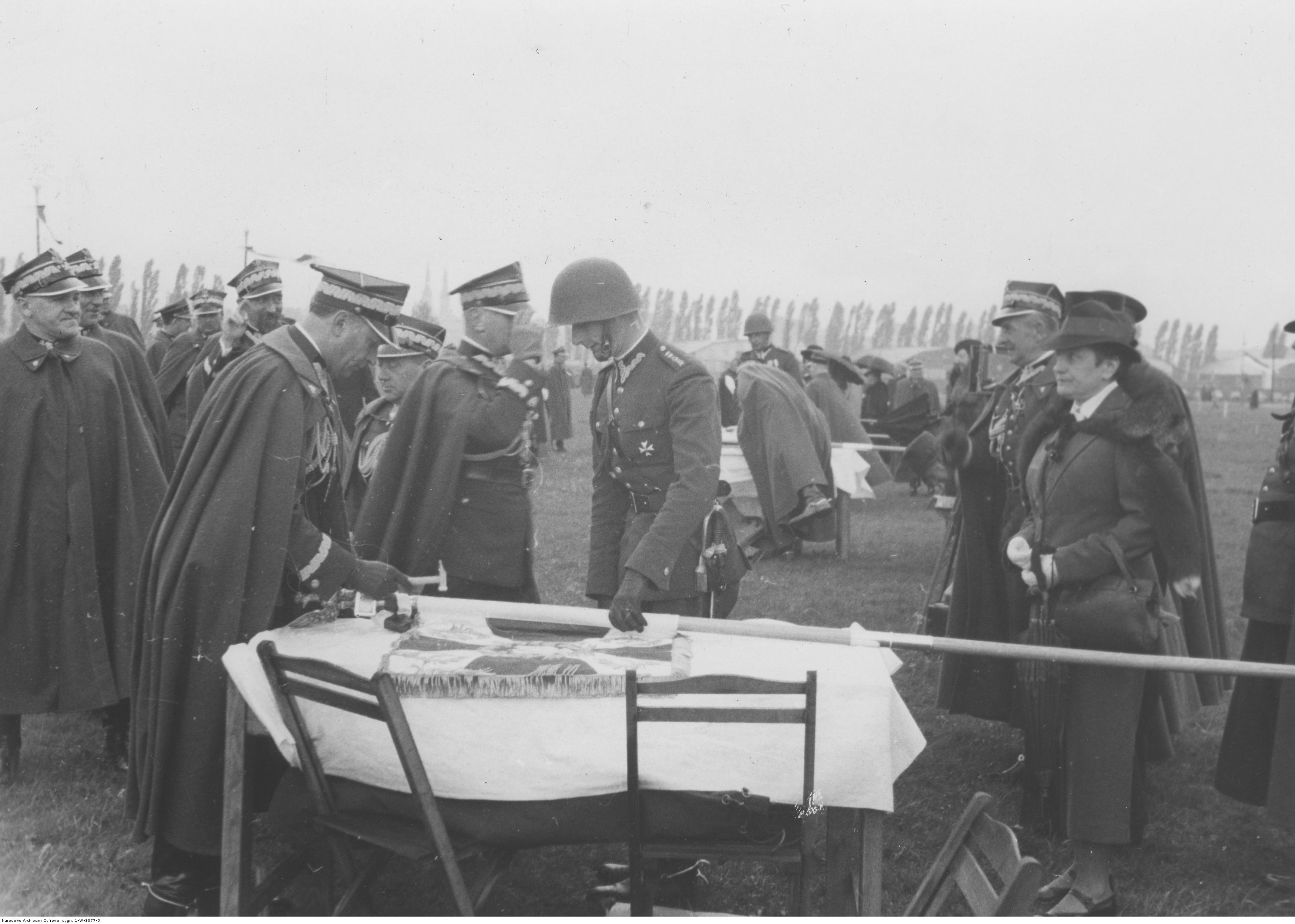 Wręczenie sztandarów jednostkom artylerii i broni pancernej; maj 1938. Gen. Tadeusz Kasprzycki wbija gwóźdź w drzewce sztandaru. Z lewej gen. Tadeusz Piskor. W głębi generałowie: Tadeusz Malinowski, Mieczysław Trojanowski. Koncern Ilustrowany Kurier Codzienny - Archiwum Ilustracji. Sygnatura: 1-W-3077-5